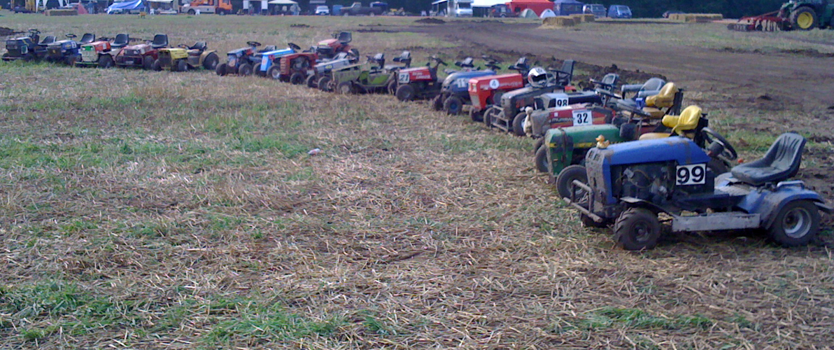 Rasenmäherrennen, Renntrecker der Teilnehmer in einer Reihe nach der NRW-Meisterschaft 2009